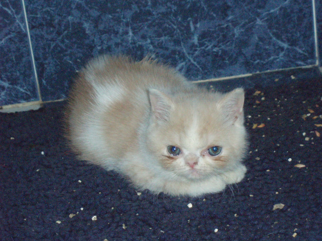 Cucciolo di gatto esotico, 54 giorni.